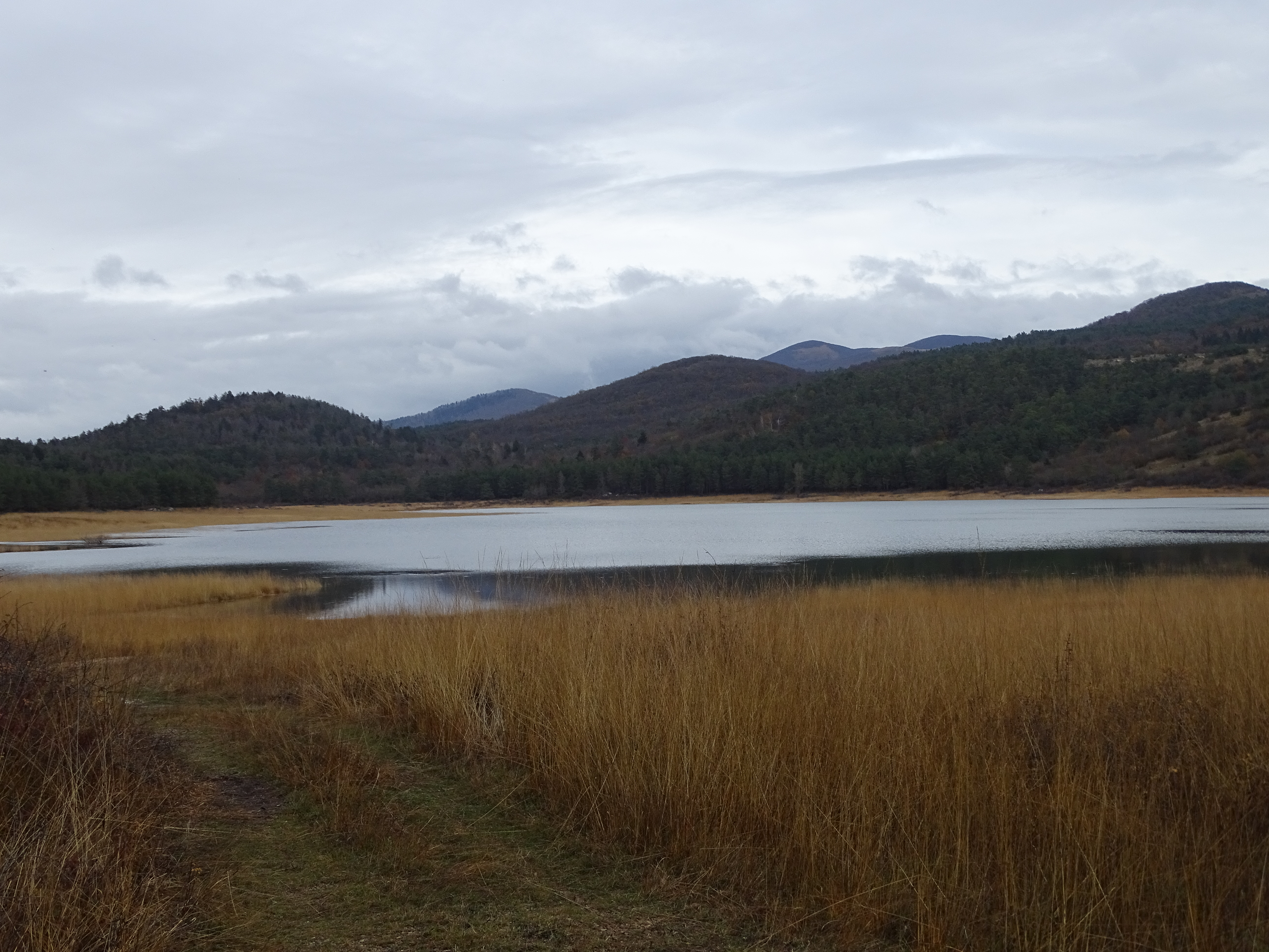 Presihajoče Petelinjsko jezero, Pivka, Slovenija.